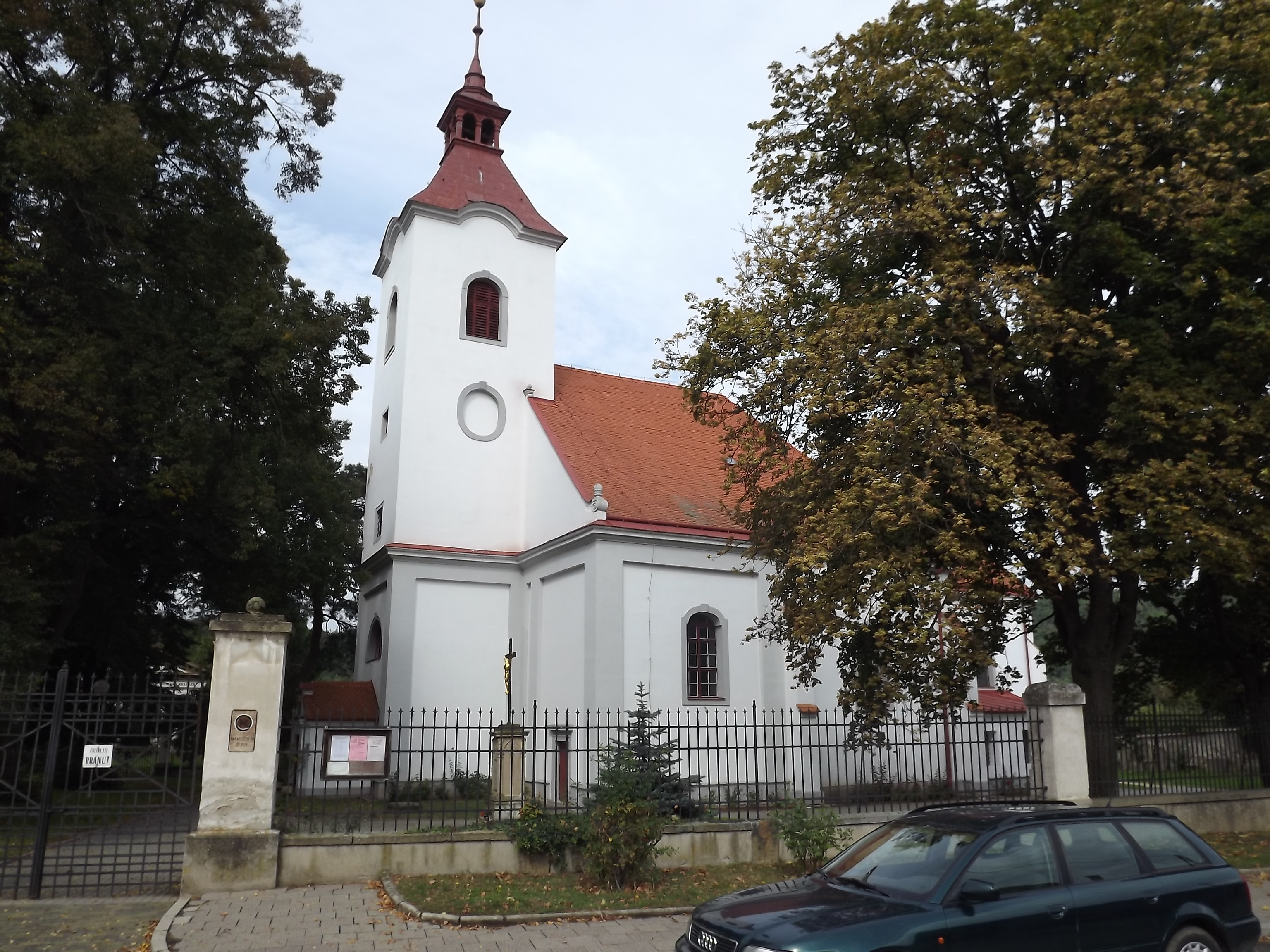 Kostel Všech svatých (Moravský Krumlov), Palackého, Moravský Krumlov